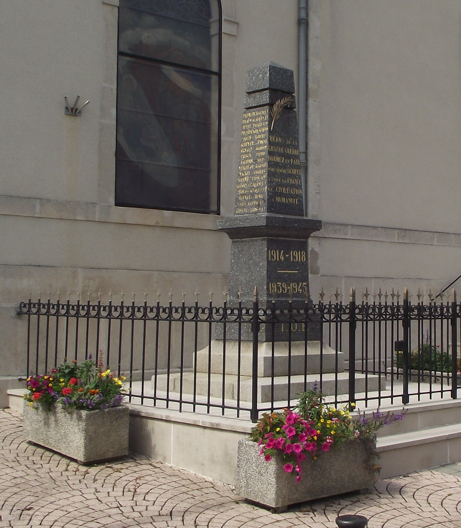 Le Monument aux morts de Dommartin-lès-Toul en mémoire des morts des deux guerres 1914-1918 et 1939-1945 est situé près de l'église.